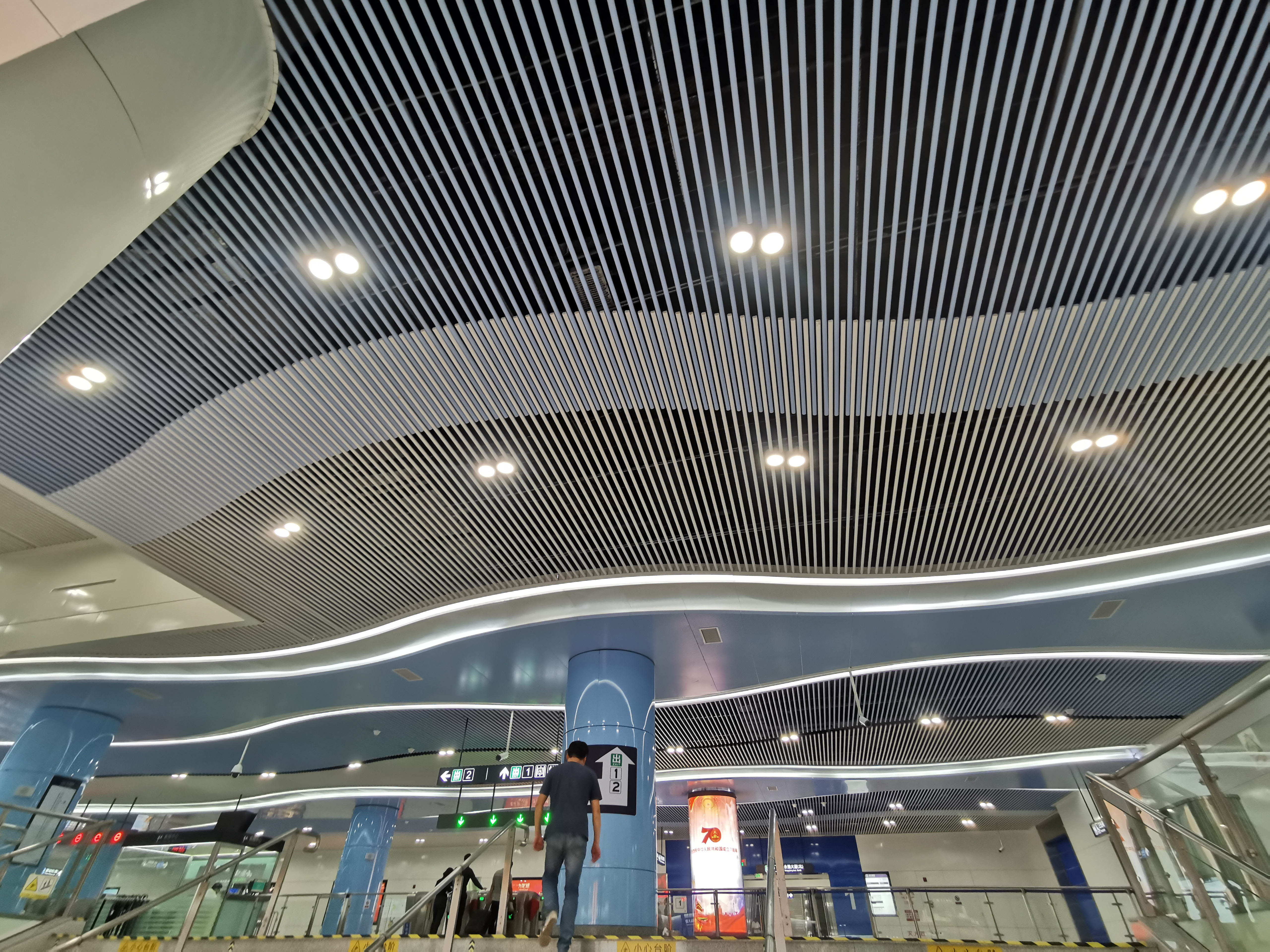 中文（中国大陆）: 温州轨道交通S1线，永中车站（北站厅）